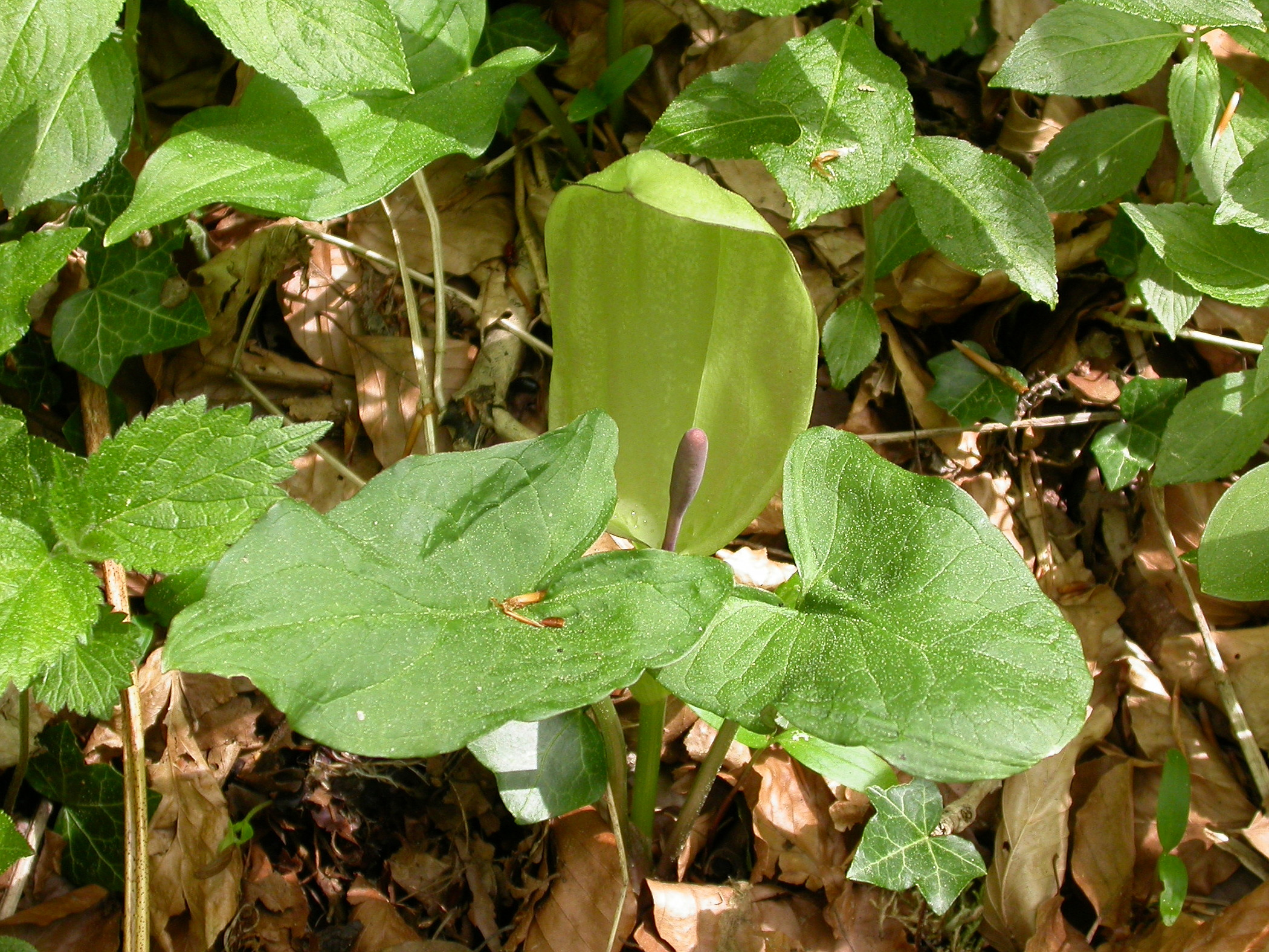 Arum maculatum, (Araceae). Biaufond, Neuchâtel, Switzerland.